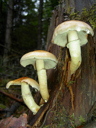 Grünblättriger Schwefelkopf an einem Baumstumpf Fotograf: Walter J. Pilsak, Waldsassen Copyright Status: GNU Freie Dokumentationslizenz